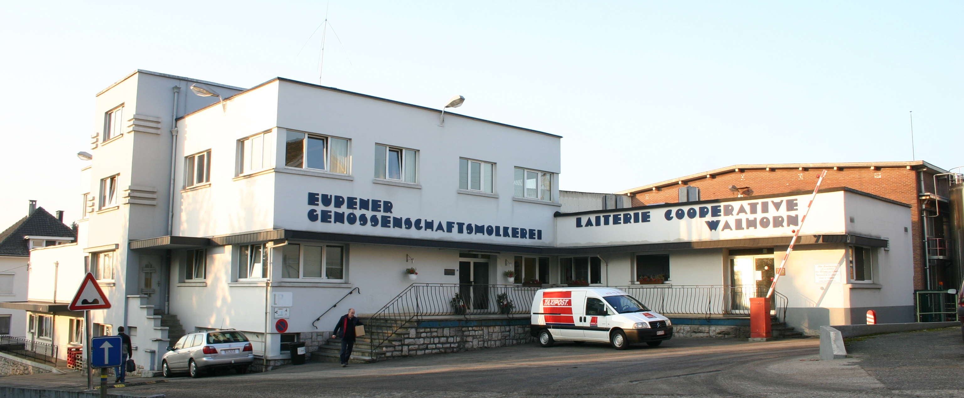 Molkerei vu Walhorn.